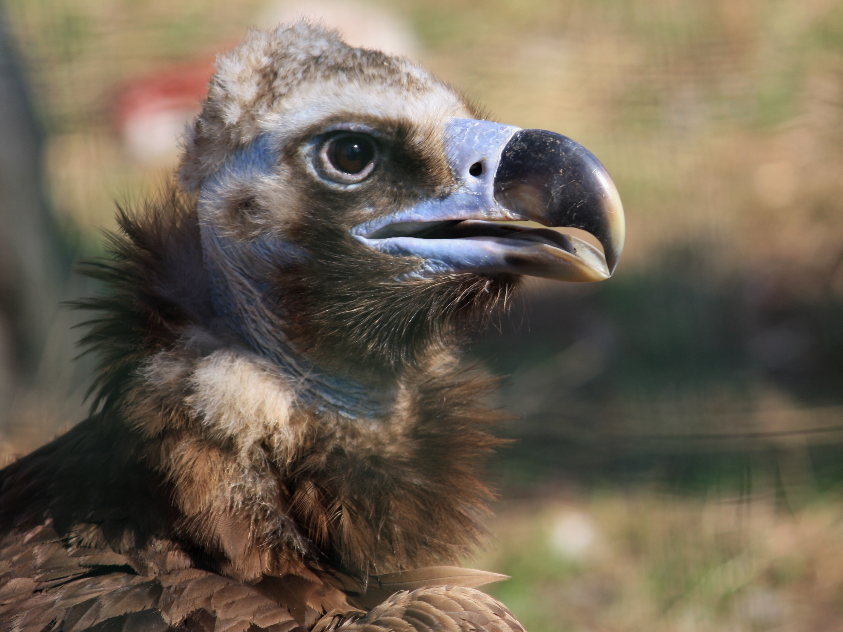 Sup hnědý v pražské Zoo